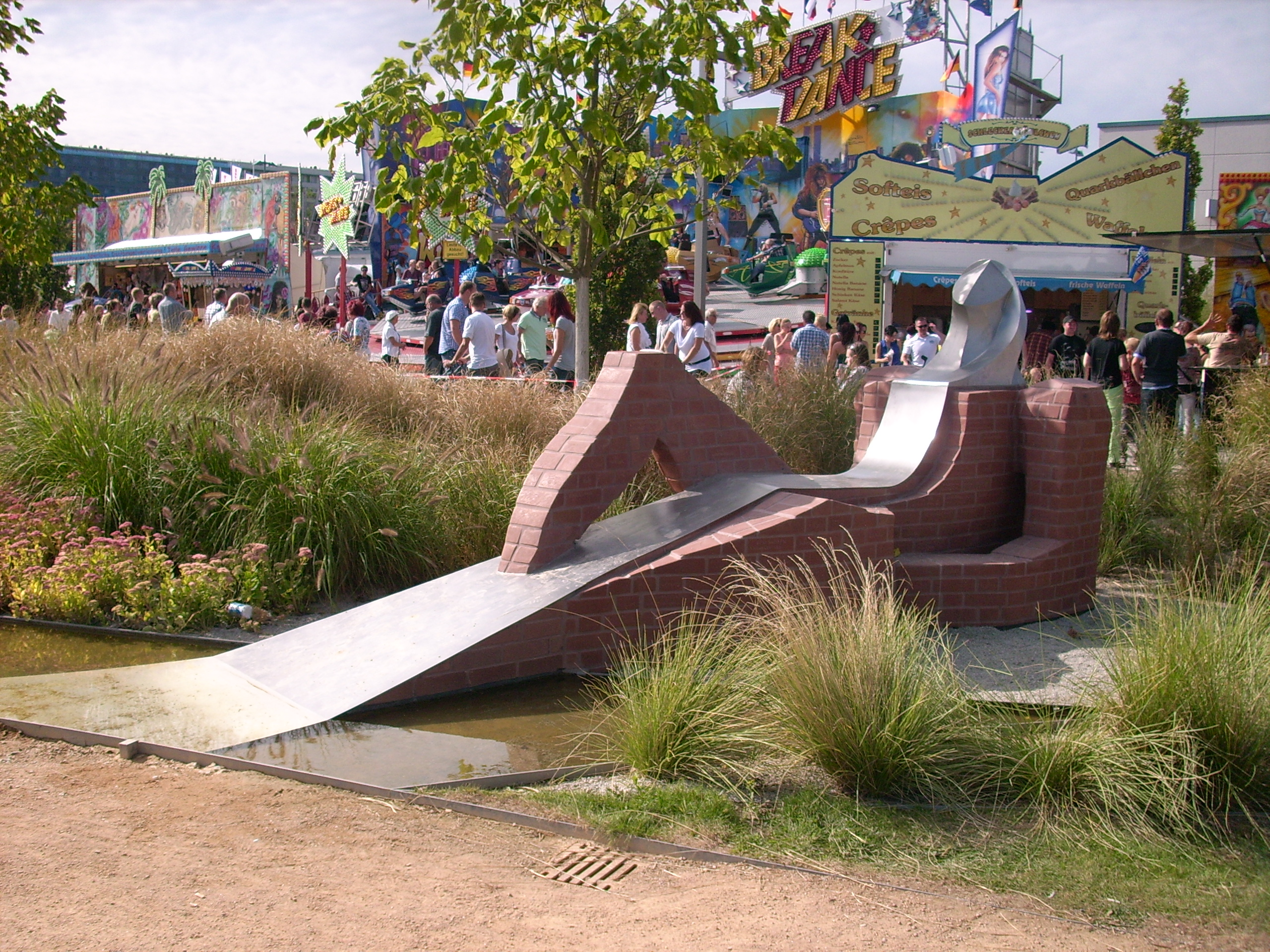 Die „Große Liegende“ von Thomas Reimann für die Schriftstellerin Brigitte Reimann im Stadtpark von Hoyerswerda